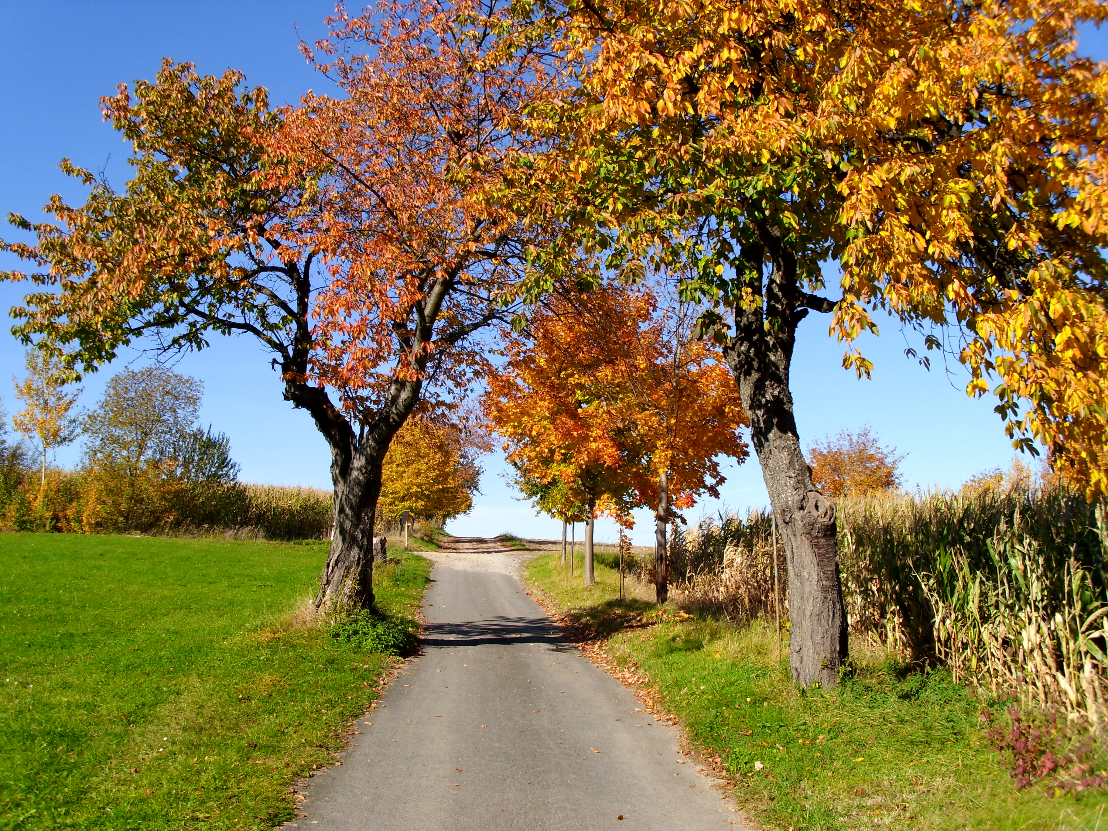 Diese Alte Straße von der Butterstraße bei Somsdorf führend über Borlas und Seifersdorf war einst ein Handelsweg.